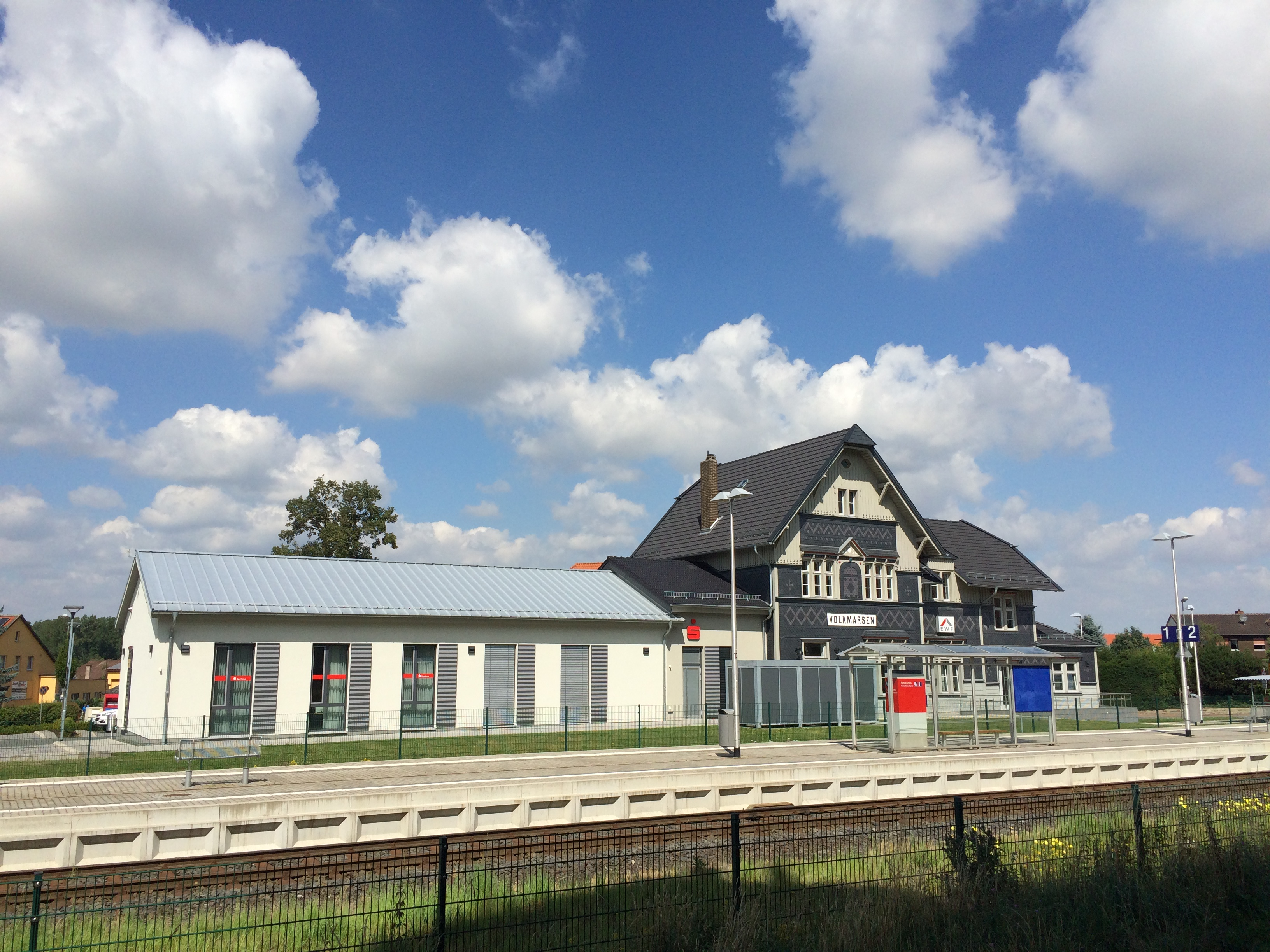 Blick von der Straße "Oberer Zollstock" über den Mittelbahnsteig (Gleise 1 und 2) auf das Bahnhofsgebäude des Bahnhofes Volkmarsen